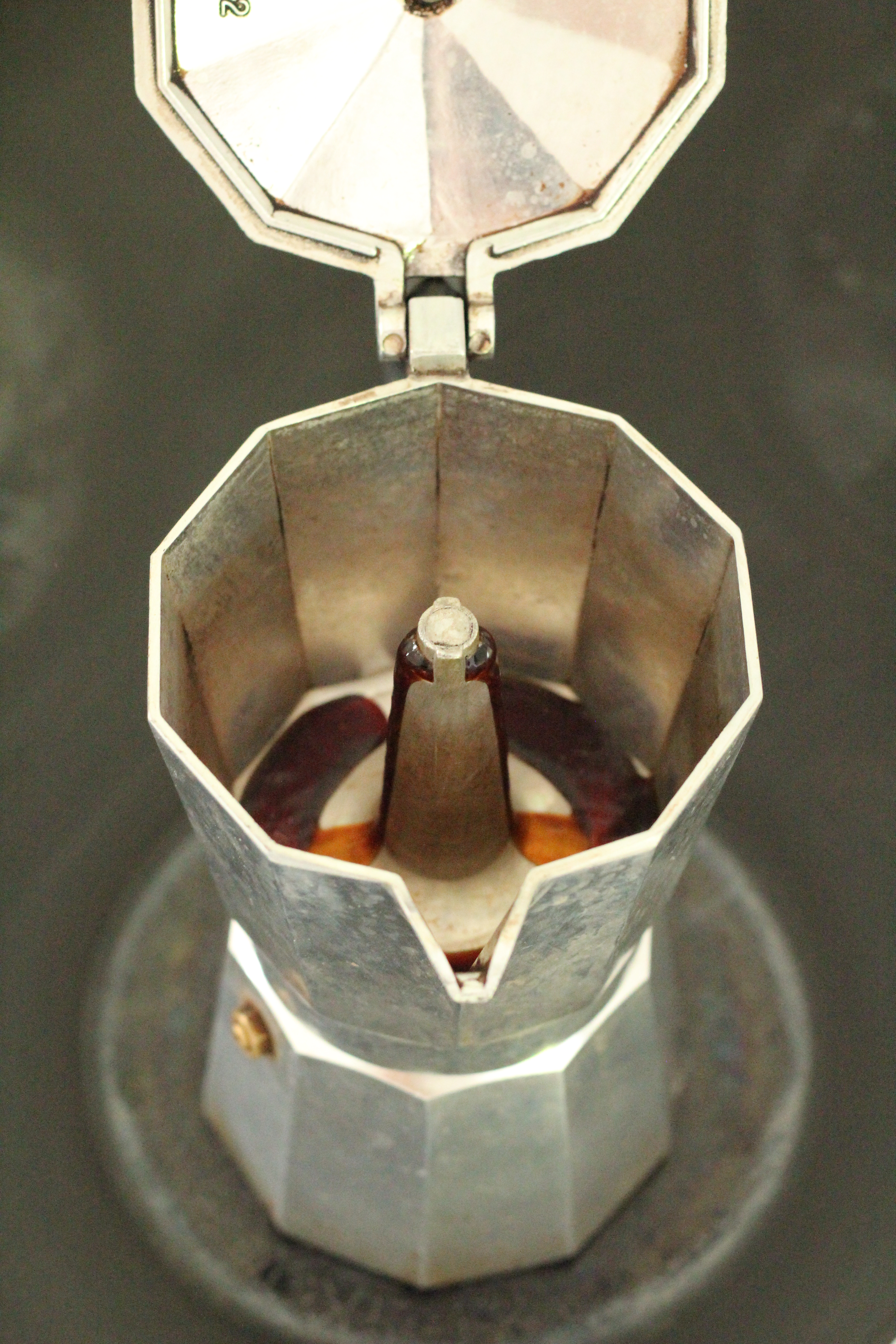 Bildinhalt: Eine Bialetti-Espressokanne mit geöffnetem Deckel und eingeschaltetem Ceran-Feld; der fertige Kaffee beginnt gerade, in den Auffangbehälter zu laufen. Aufnahmeort: Baden-Baden, Deutschland